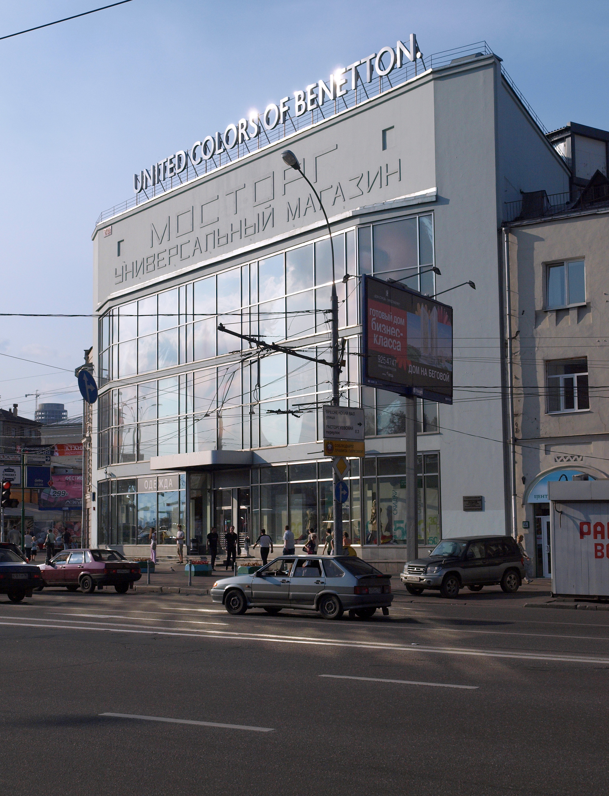 1927 department store in Moscow